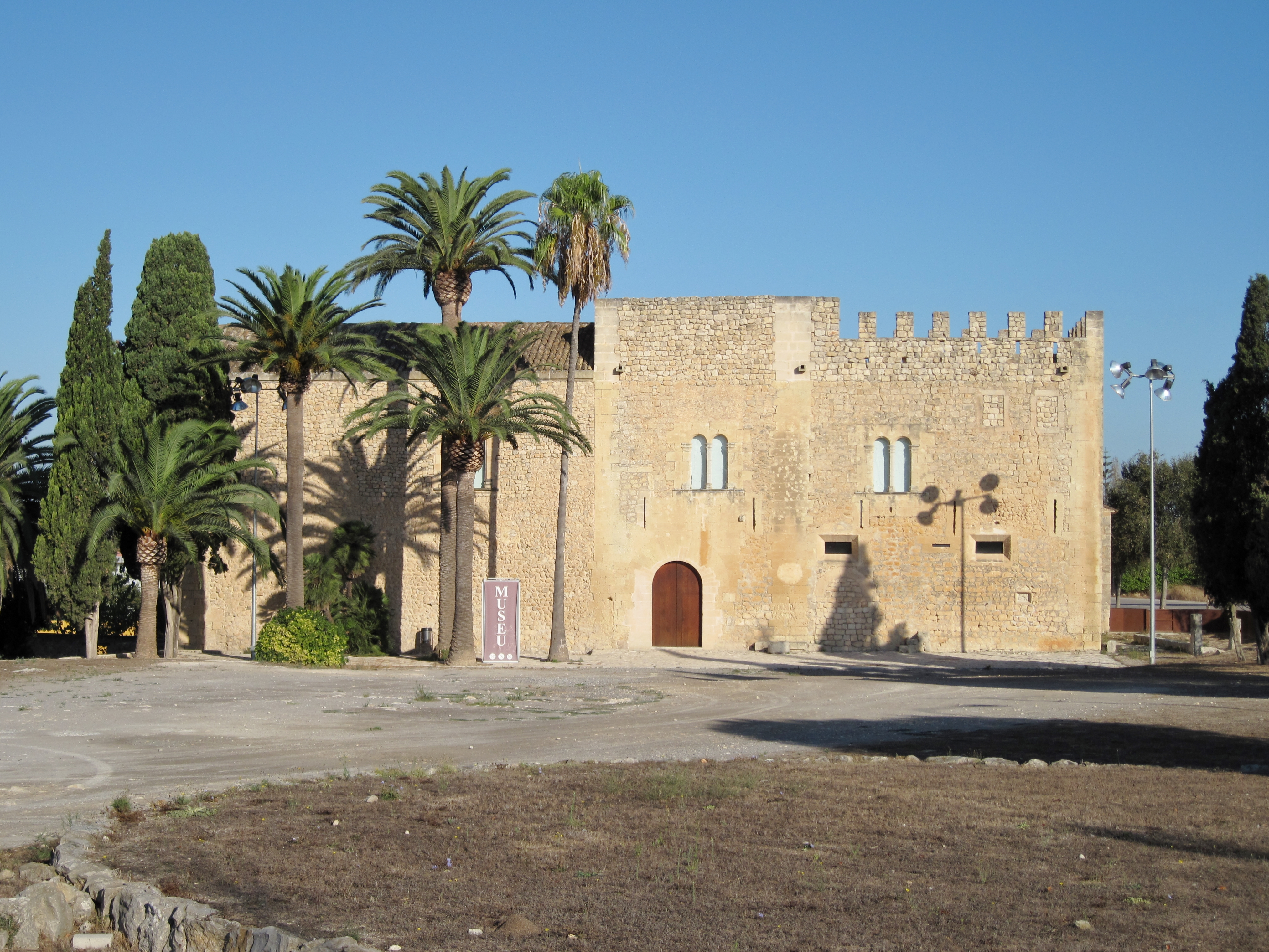 Gebäude des Historischen Museums von Manacor (Museu d’Història de Manacor), Gemeinde Manacor, Mallorca, Spanien